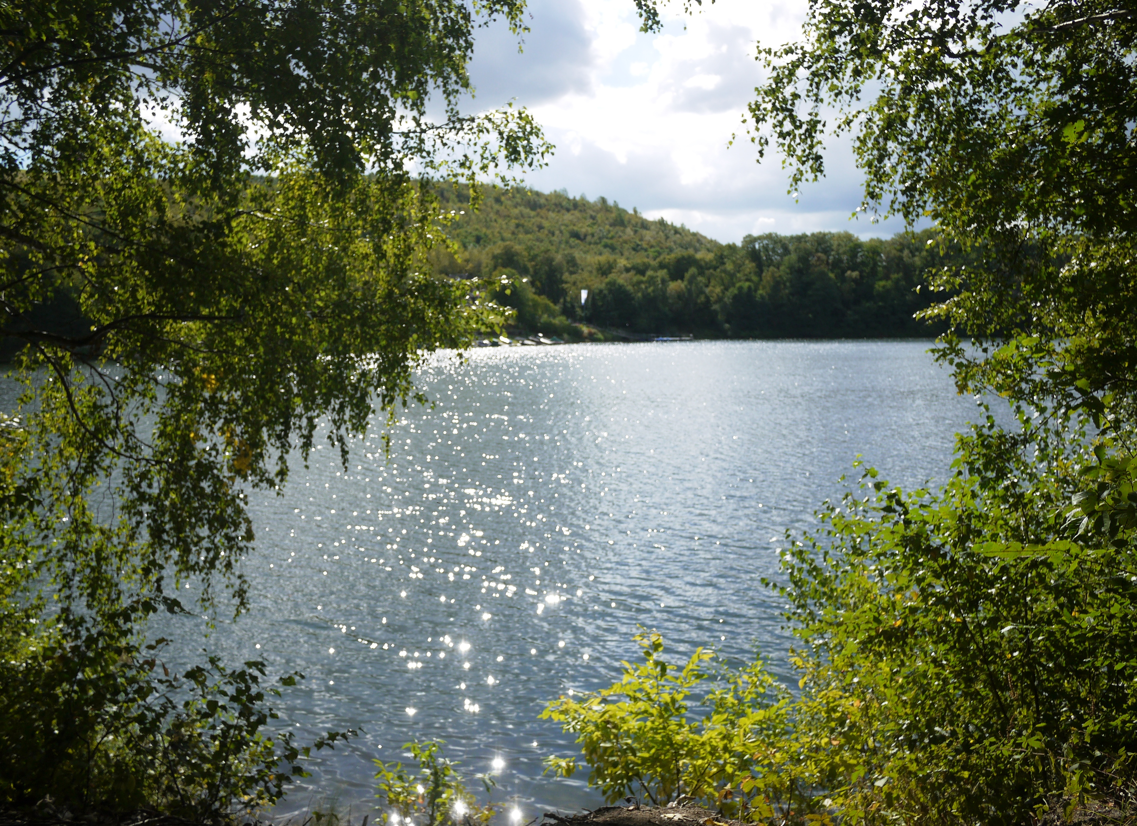 Waldee, eine ehemalige Kiesgrube, im Moerser Teil des Baerler Busch mit der Halde Rheinpreußen im Hintergrund